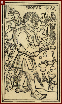 Aesop's fables. German] Vita et Fabulae. [Augsburg, Anton Sorg, ca. 1479][37], xxviii [i.e. cxxviii], [15] leaves. woodcuts: illus., initials. 30 cm. (fol.).